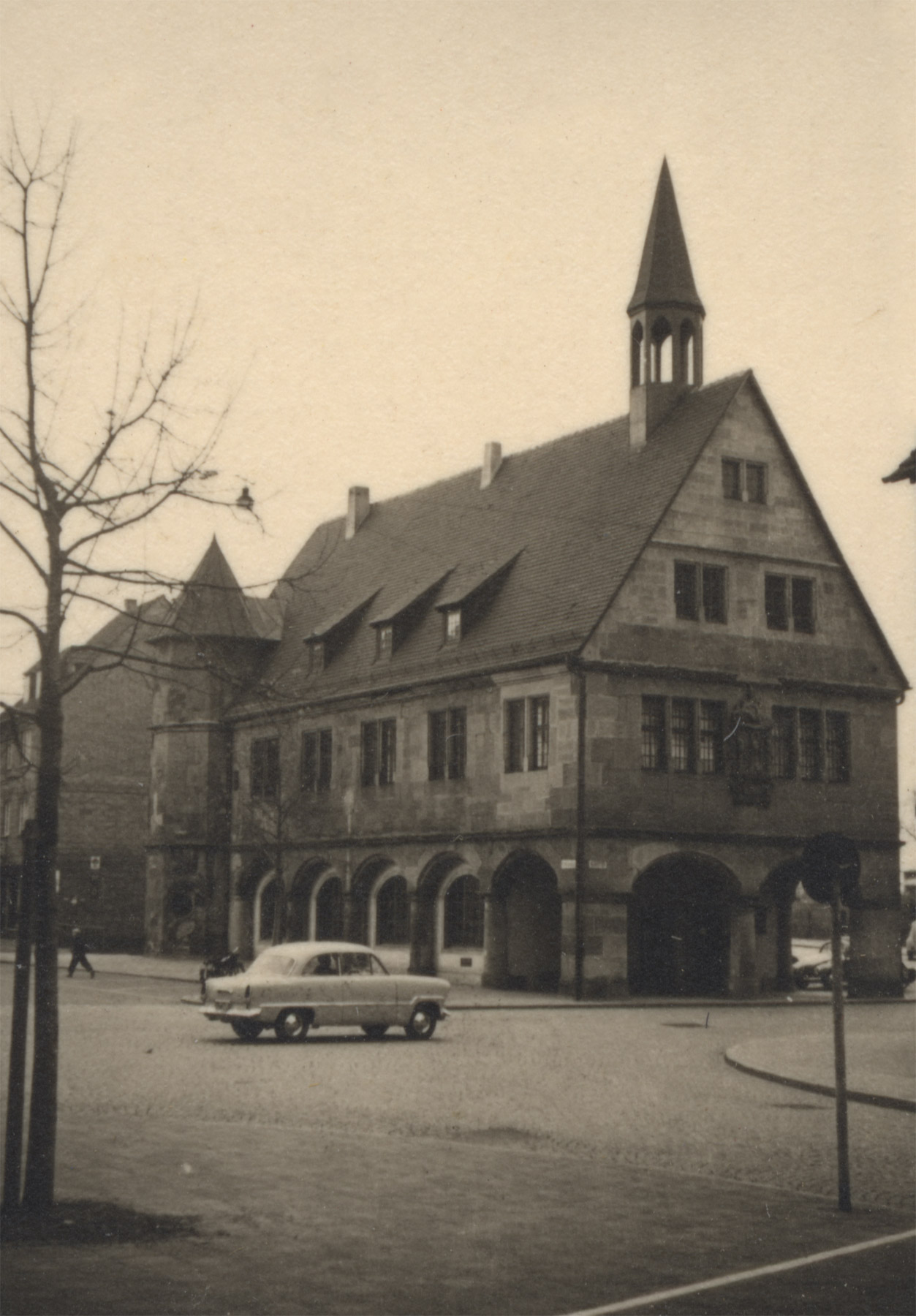 Fleischhaus in Heilbronn, 1950er Jahre